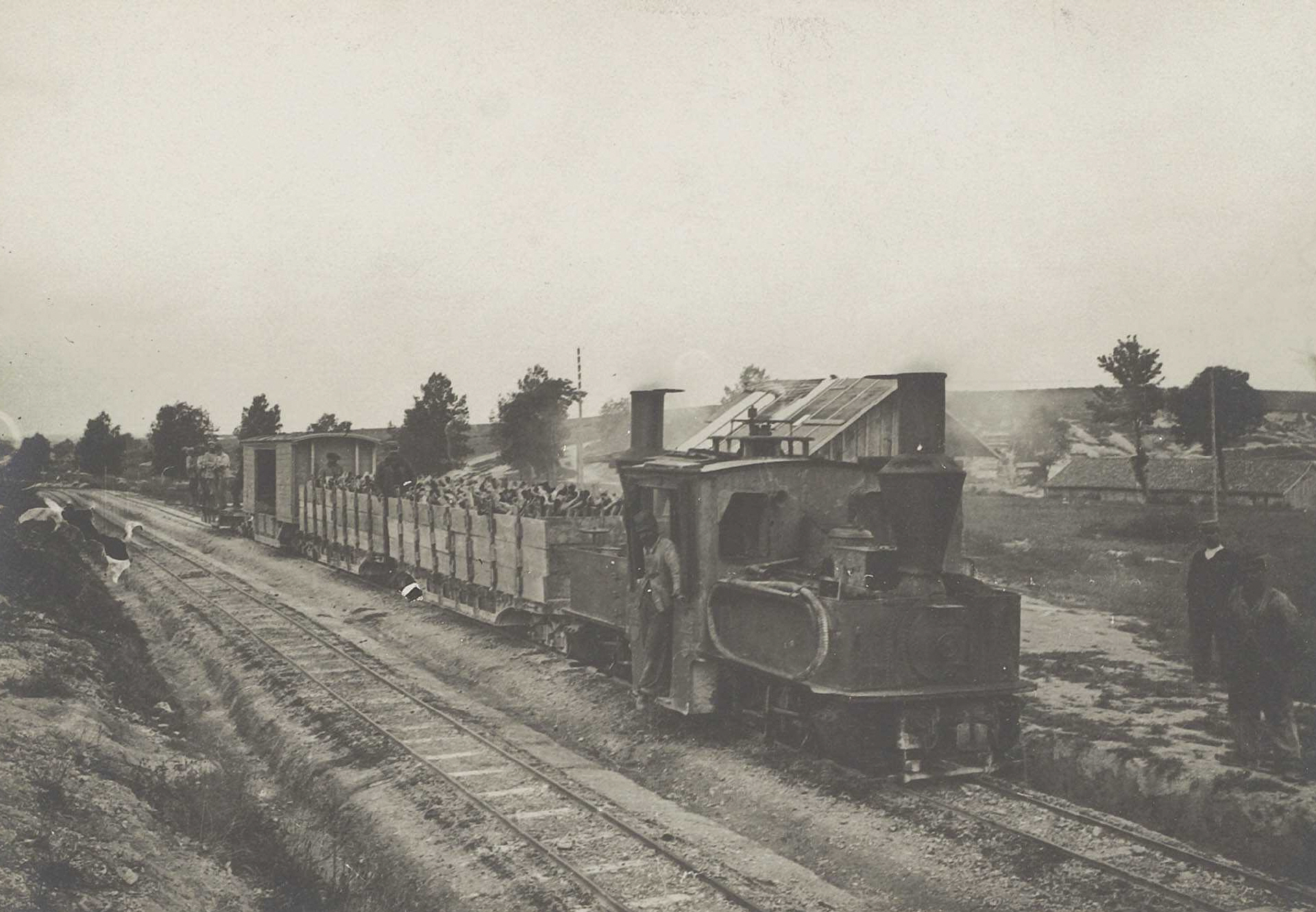 La Decauville à Saint-Jean-sur-Tourbe transporte des douilles vides du front de Massiges